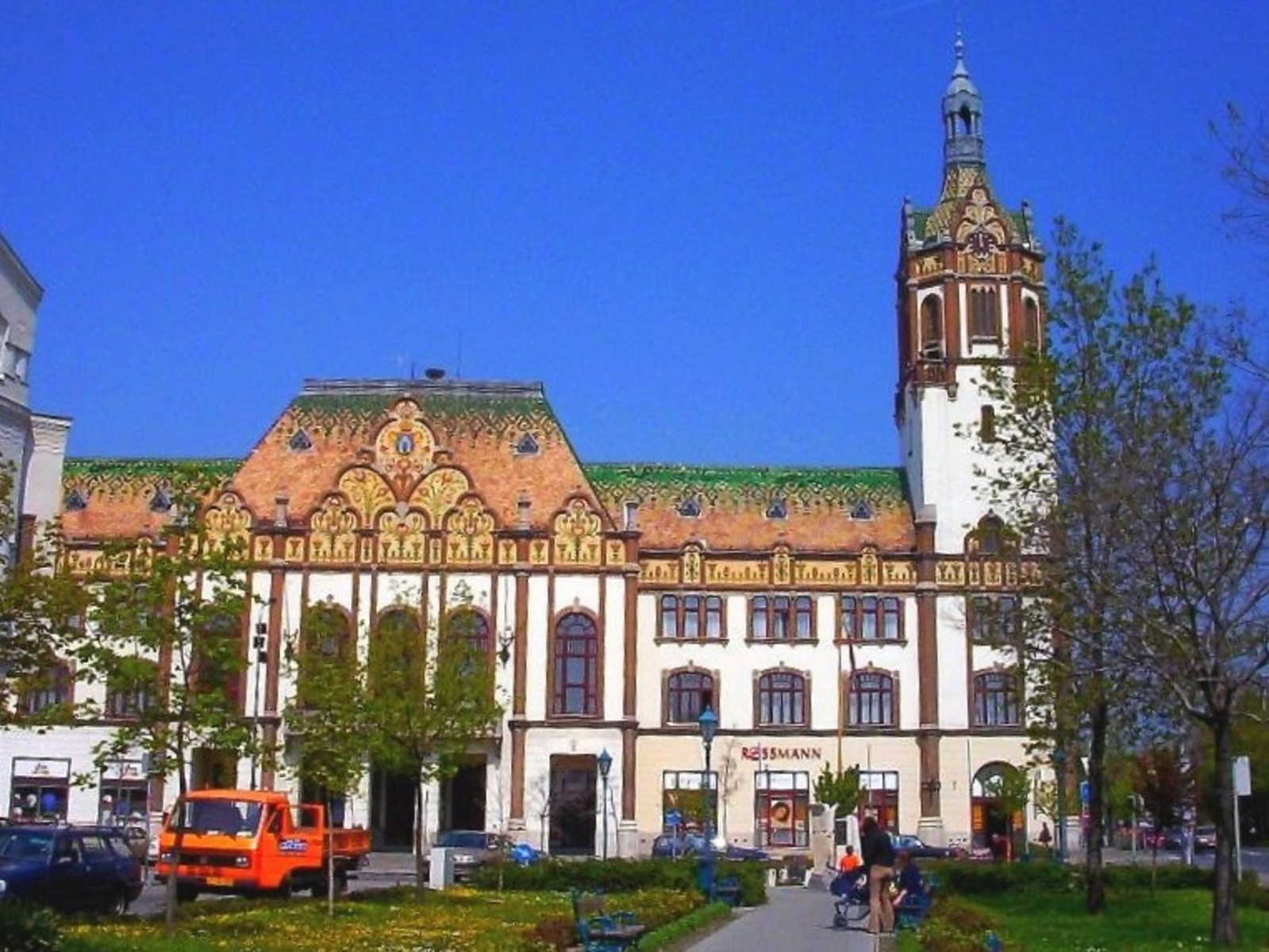 Városháza (Kiskunfélegyháza, Kossuth Lajos u. 1.) This is a photo of a monument in Hungary, Identifier: 2287